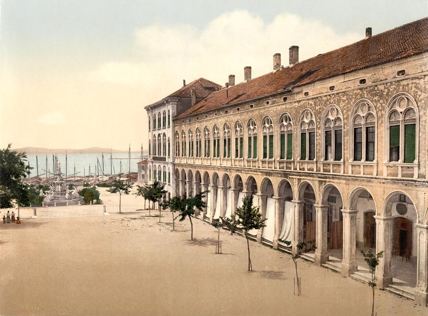 Spalato Hotel de Ville Dalmatia Austro-Hungary